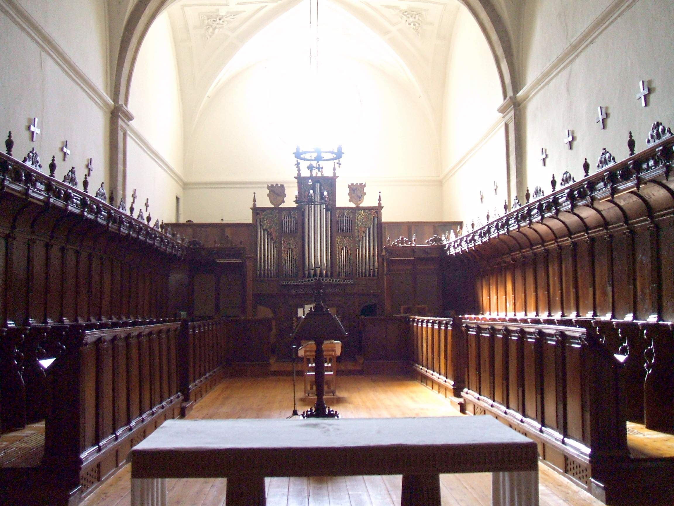 Monasterio trapense de Santa María de Carrizo, en Carrizo de la Ribera (León) . Coro y capítulo de las monjas